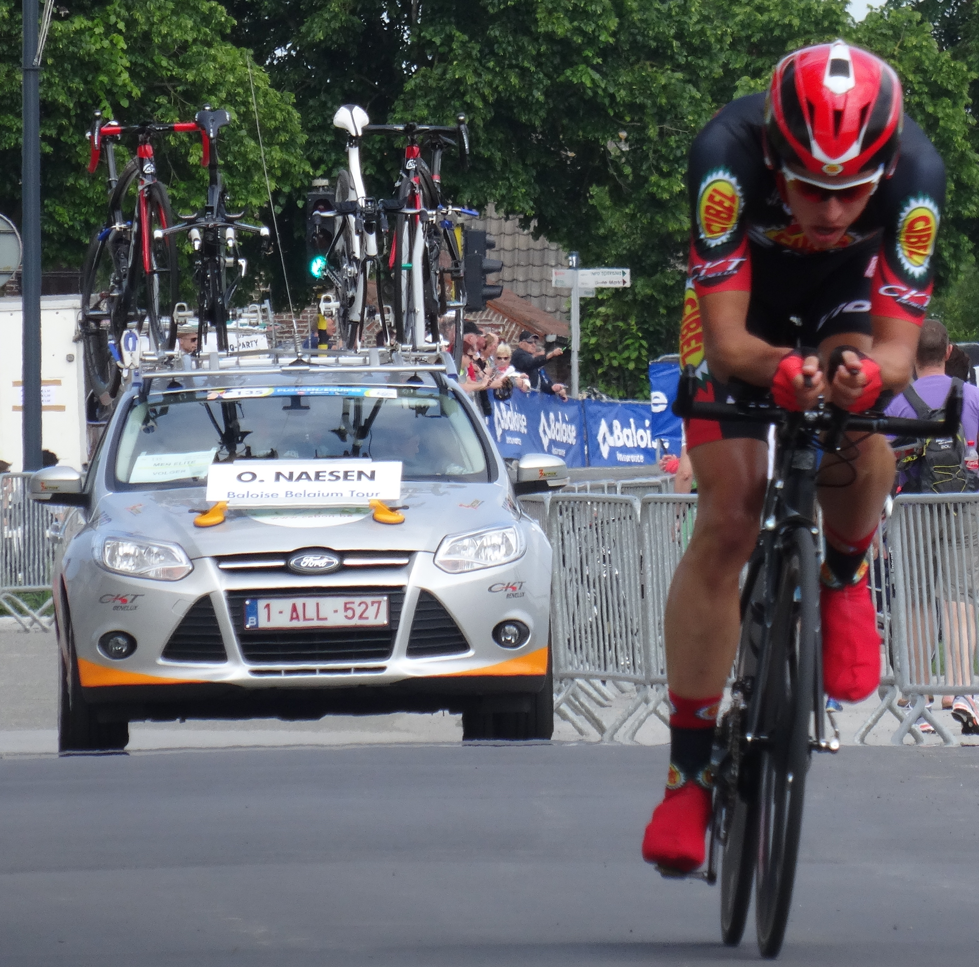 Reportage photographique réalisé le vendredi 30 mai à l'occasion du contre-la-montre individuel de la troisième étape du Tour de Belgique 2014 à Dixmude, Belgique.